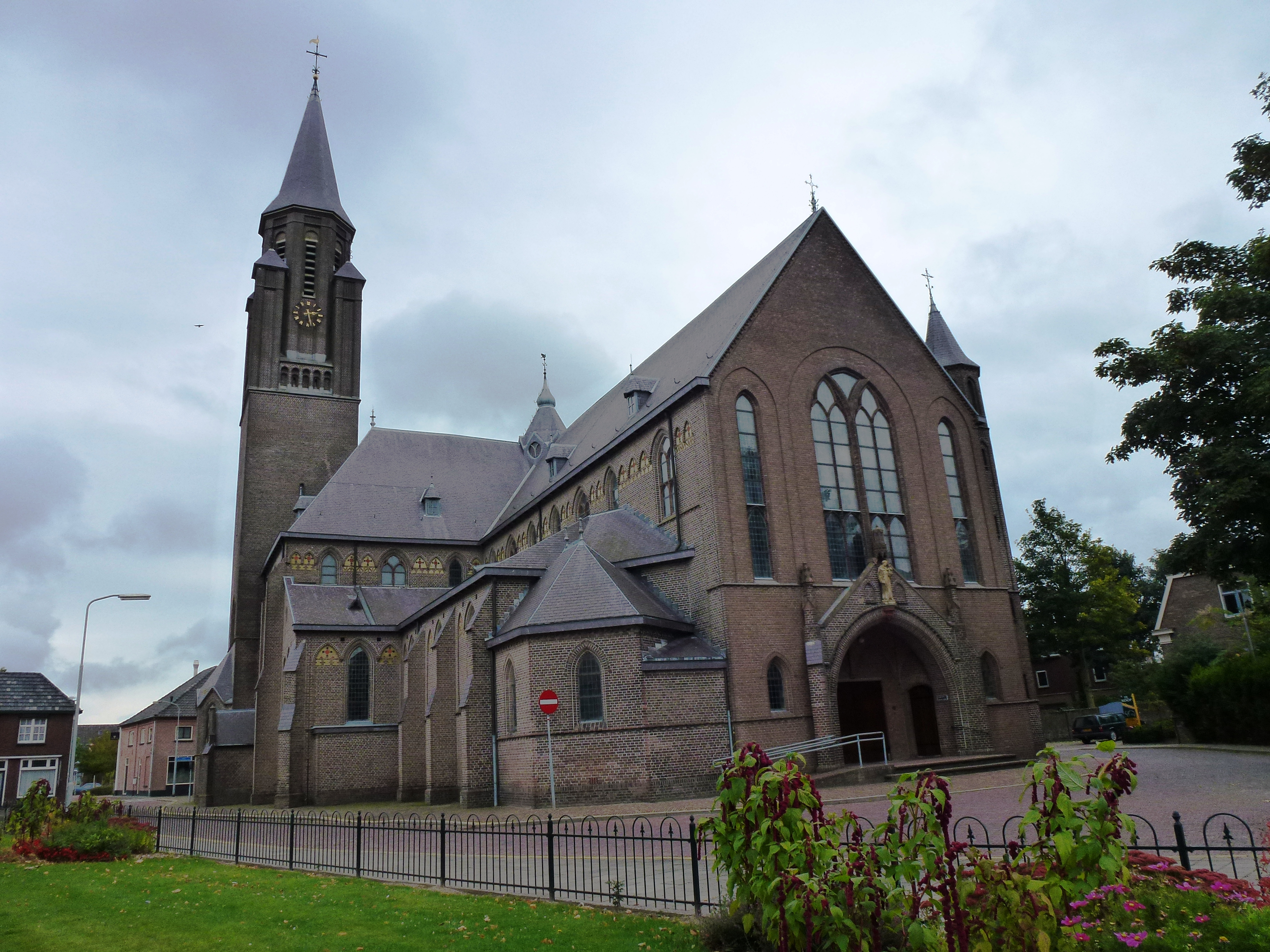 Sint-Anthoniuskerk, Millingen aan de Rijn